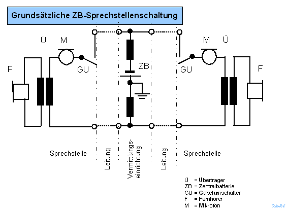 Sprechstellenschaltung für Zentralbatteriebetrieb